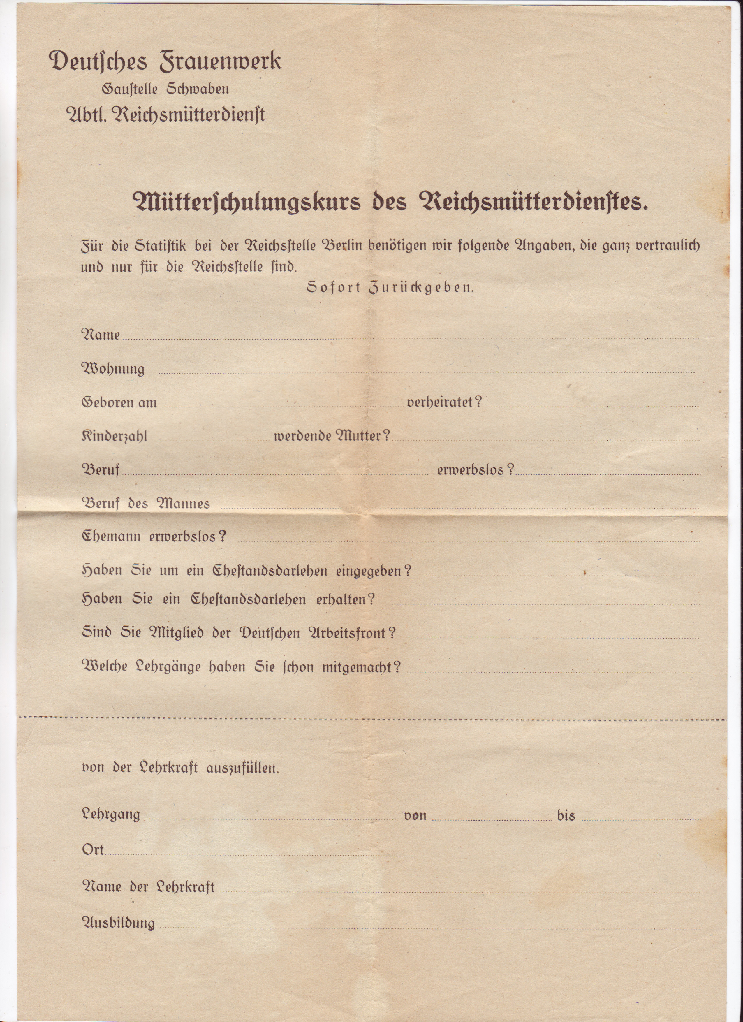 Mütterschulungskurs des Reichsmütterdienstes, Deutsches Frauenwerk, Abteilung Reichsmütterdienst, Blanko-Formular